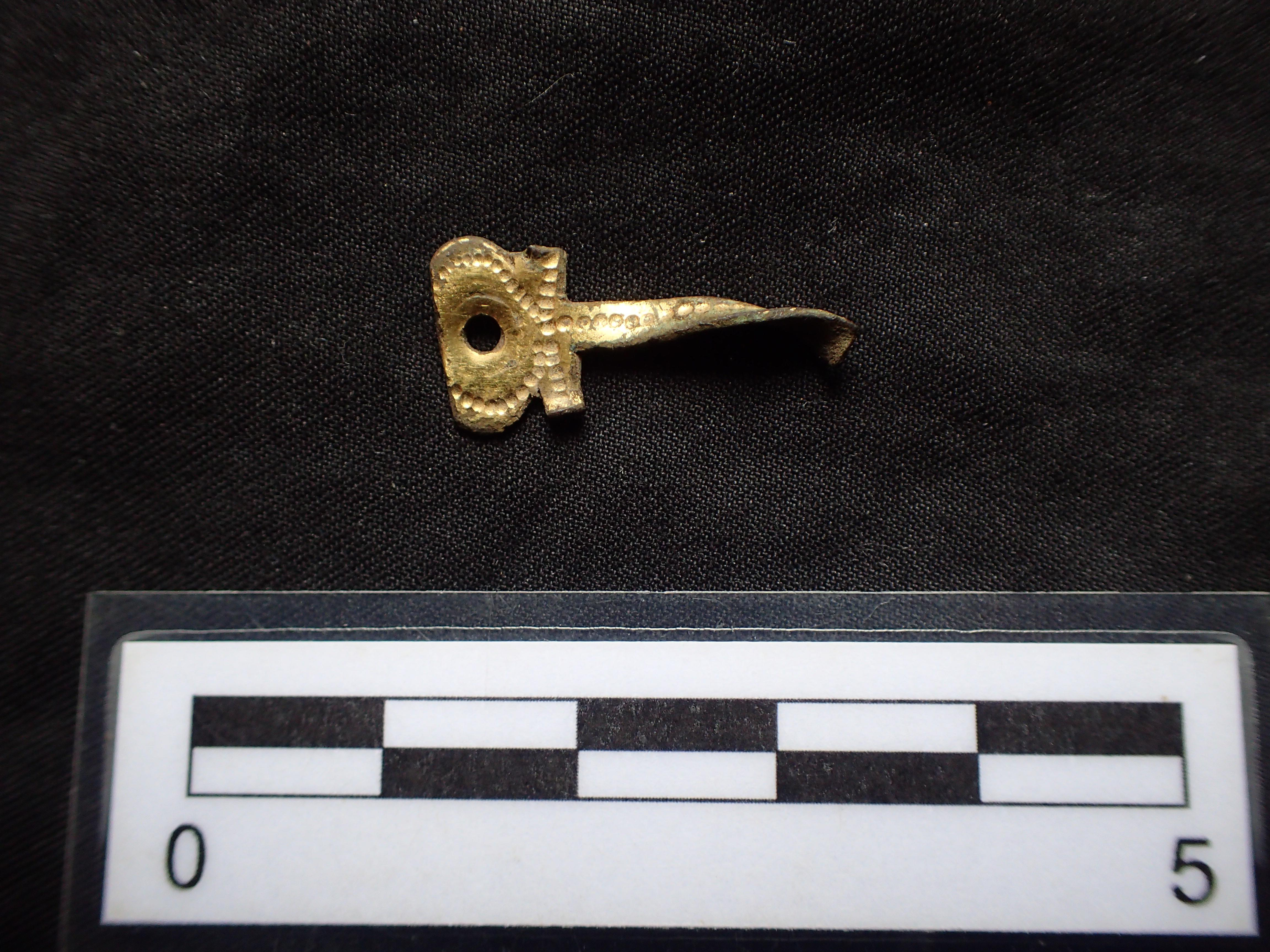 Aurkikuntza arkeologiakoa Lantoron gazteluan aurkitua (Araba)